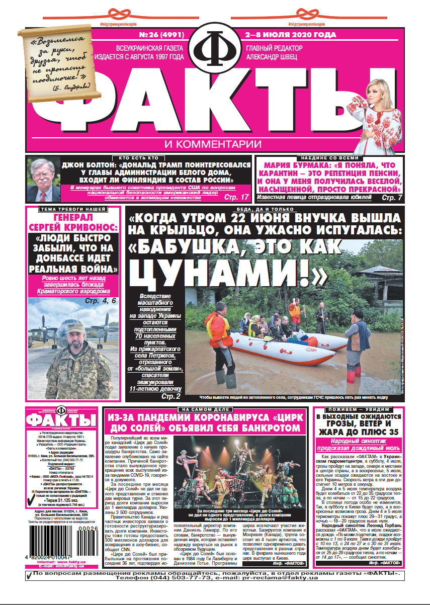 Обкладинка газети "Факти та коментарі" за 2 липня 2020 року